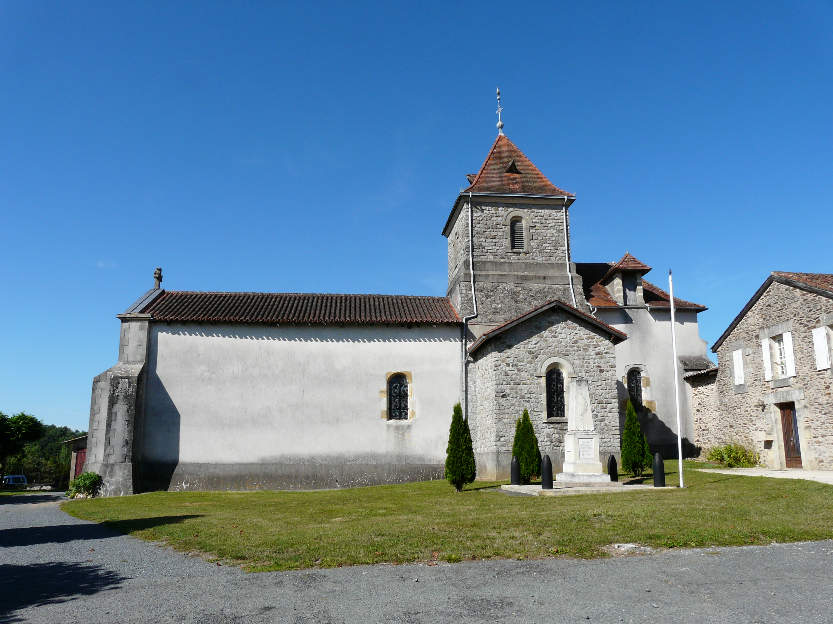 L'église Saint-Agnan, Chalais, Dordogne, France